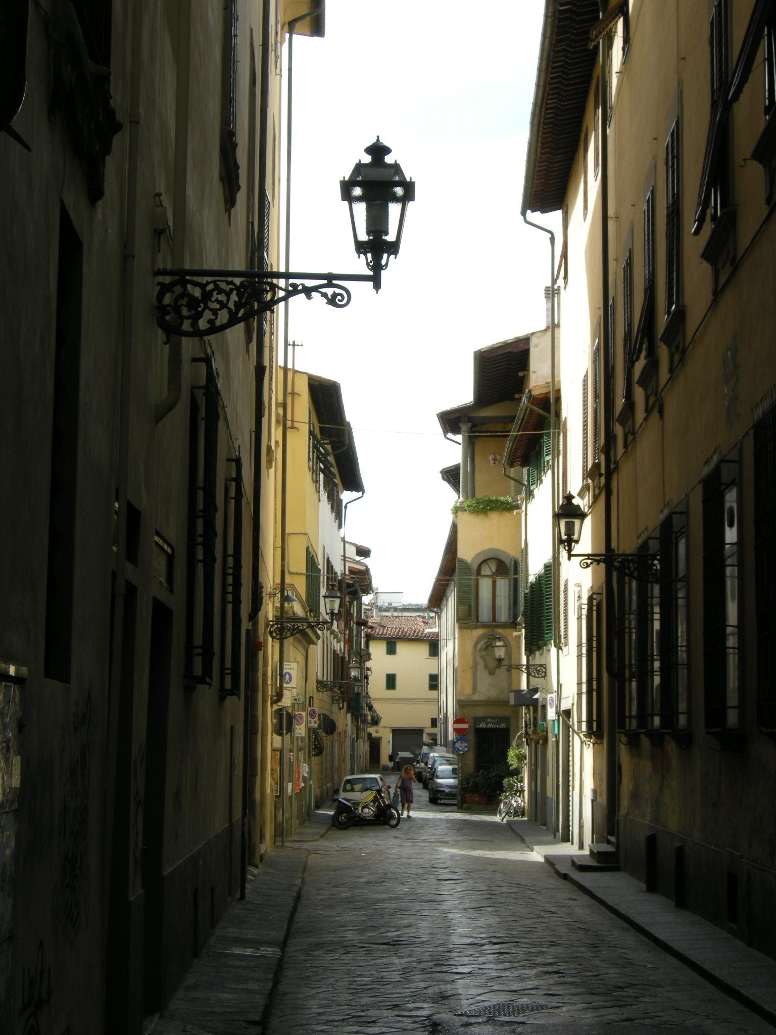 Via taddea